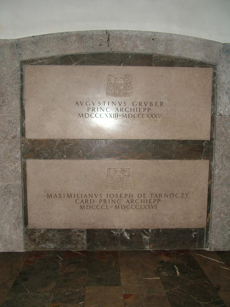 Grab der Erzbischöfe Gruber und Tarnóczy in Salzburg